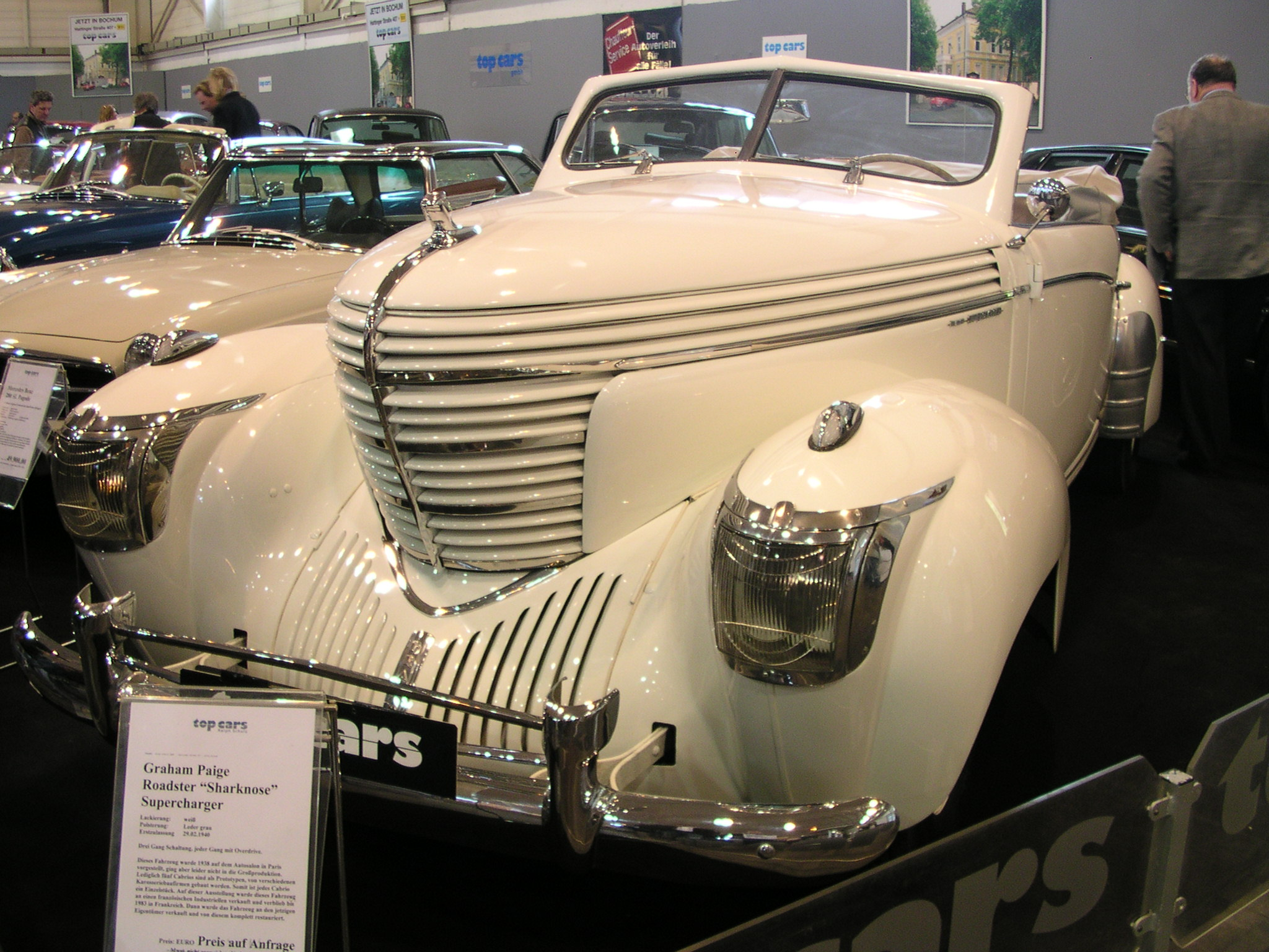 Essen, Technoclassica 2005. Graham-Paige Roadster “Sharknose” Supercharger, Baujahr 1940. Nur fünf Fahrzeuge sind als Prototypen von verschiedenen Karosseriebaufirmen gebaut worden.